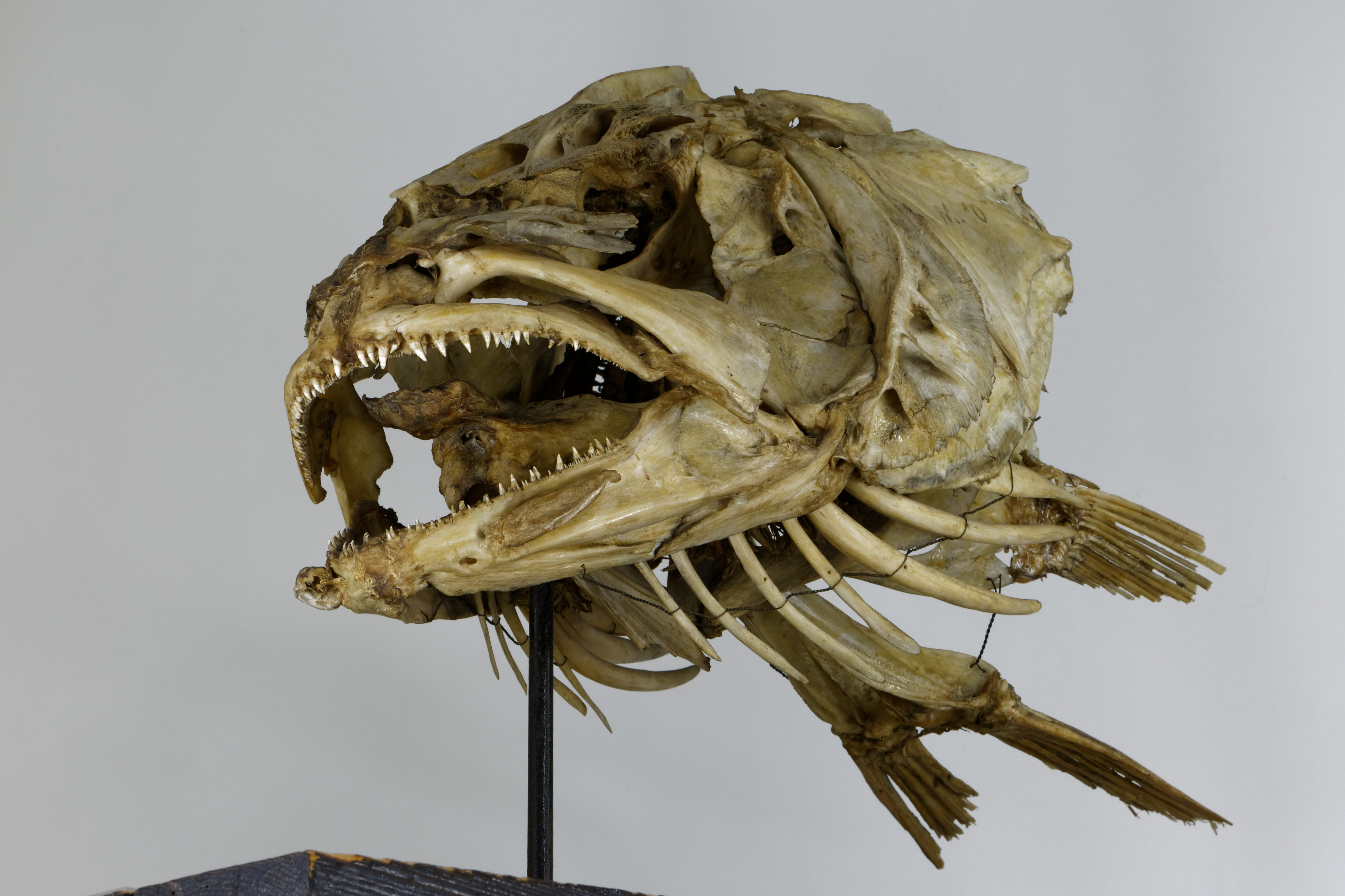 collection de l'Université Pierre-et-Marie-Curie à Paris.